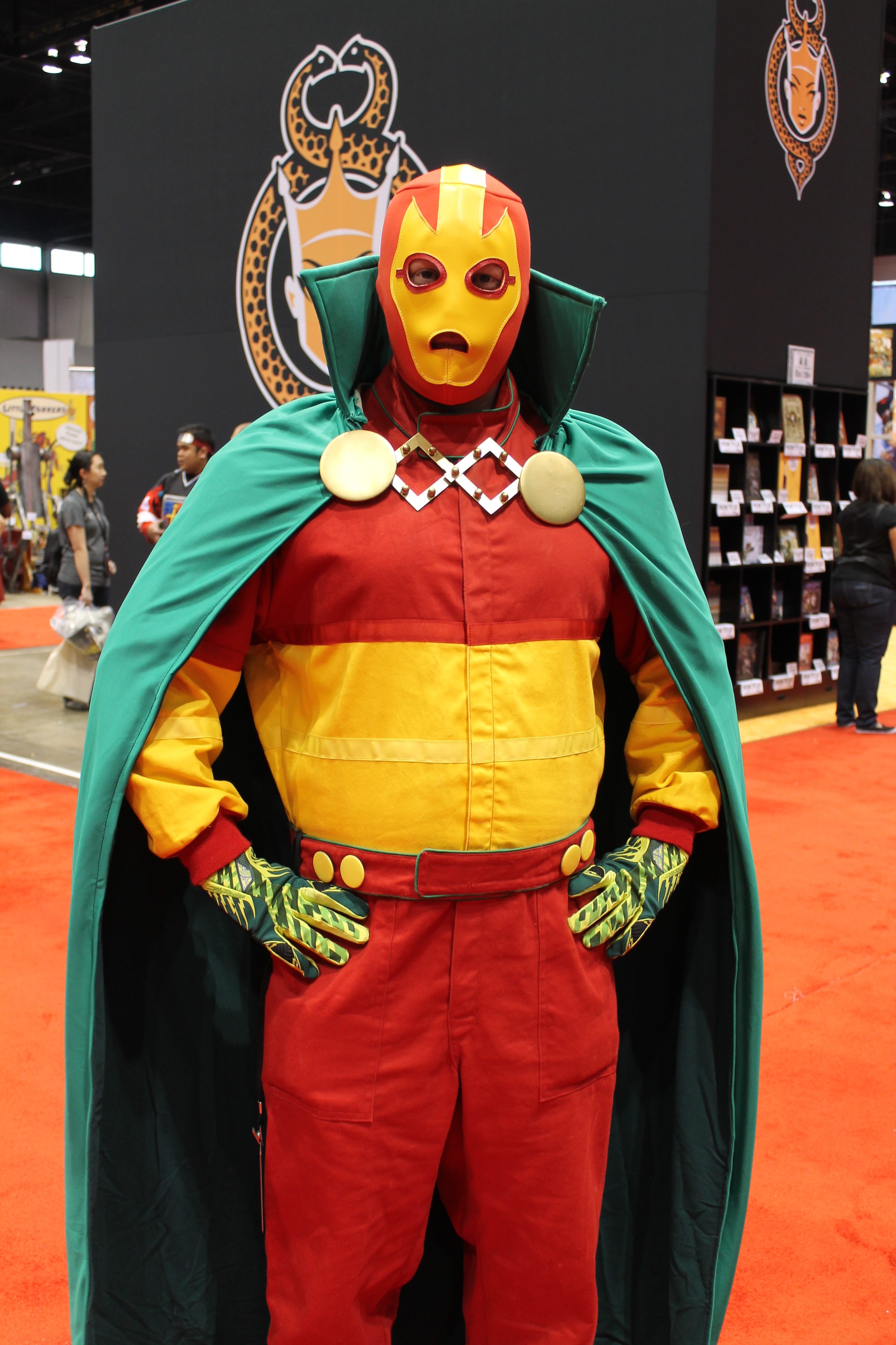 Cosplay de Mister Miracle